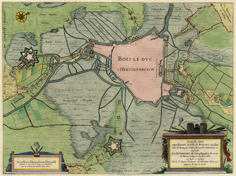 title=Bois-le-Duc - 's Hertogenbosch;size=39x52